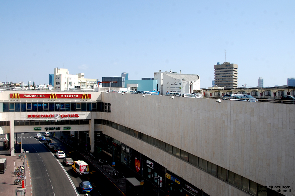 מבט מהגשר העליון של חניון דיזינגוף סנטר